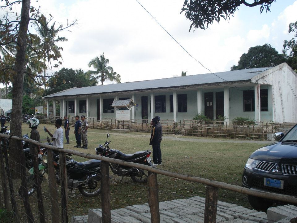 Fohoren